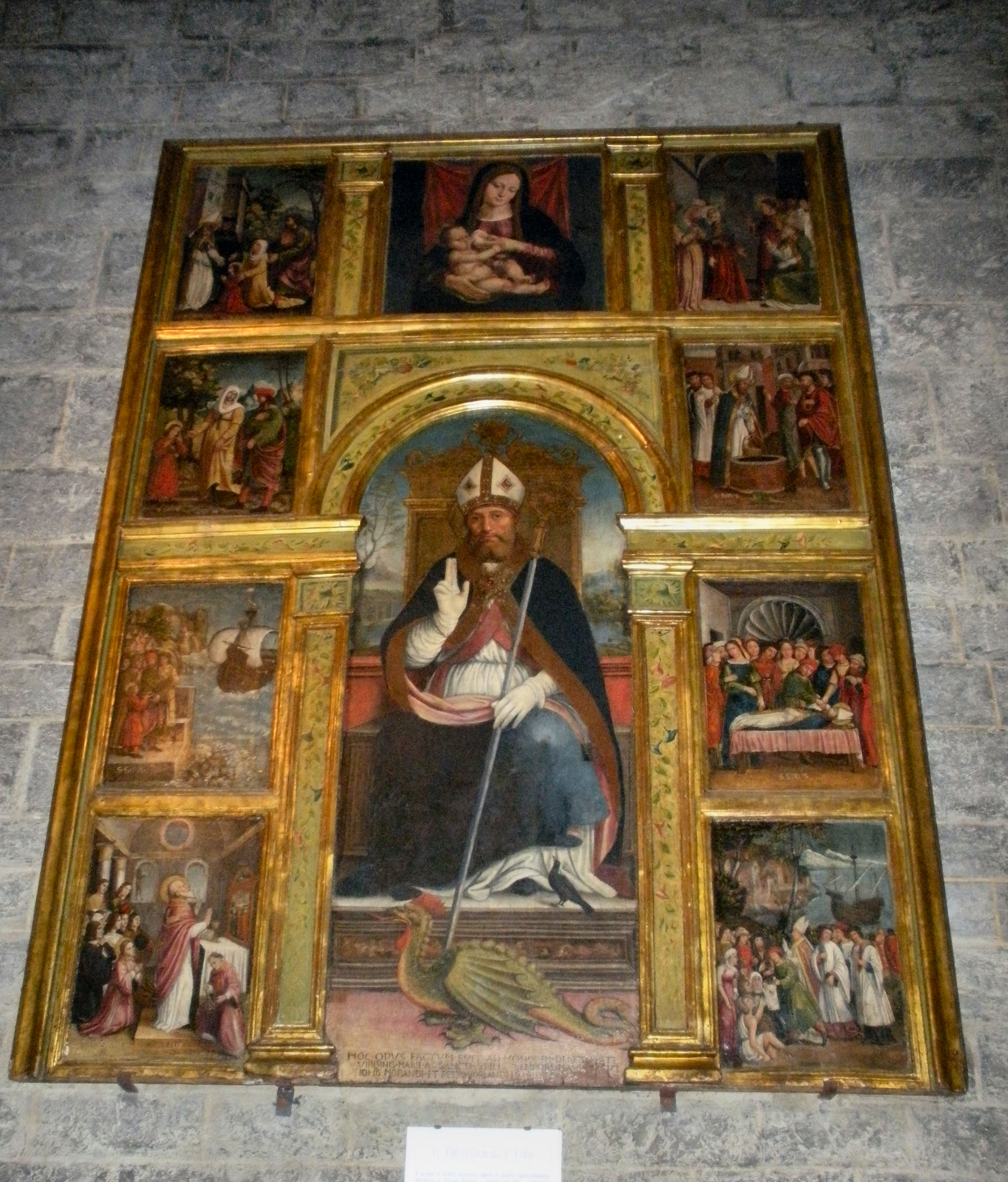 Il Polittico di San Siro, nella chiesa di San Siro di Struppa (Genova)